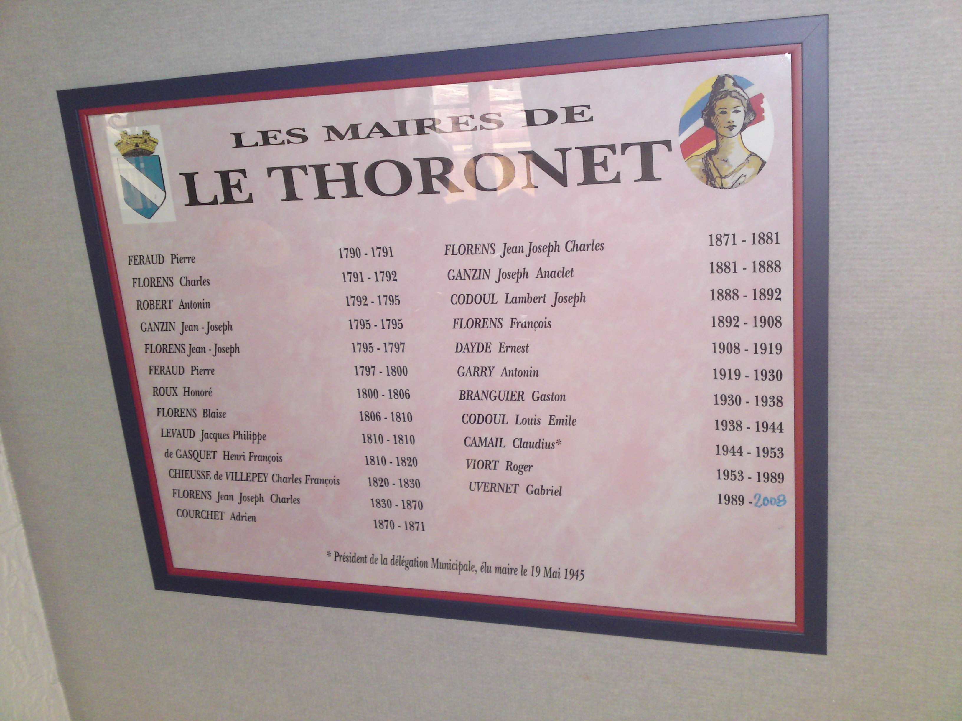 maires de la commune Le Thoronet dans le Var France, depuis la révolution française